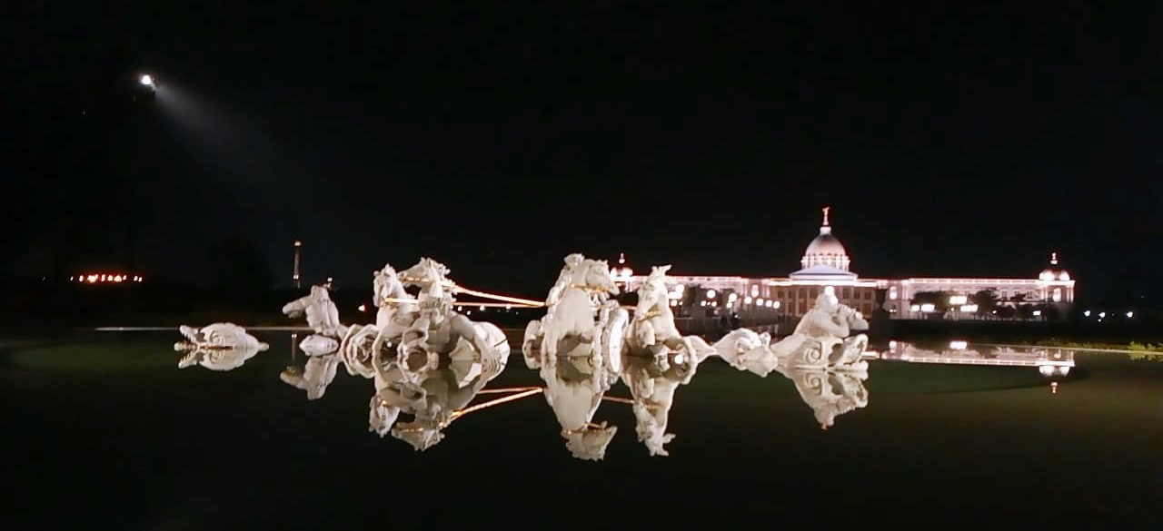 夜間拍攝的奇美博物館